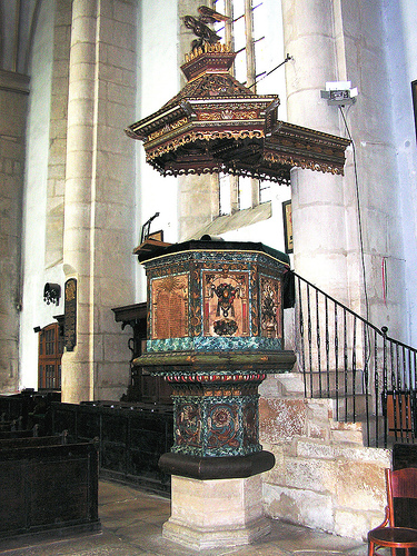 Cluj-Napoca, Biserica Reformată-Calvină (str. M.Kogălniceanu nr.21)